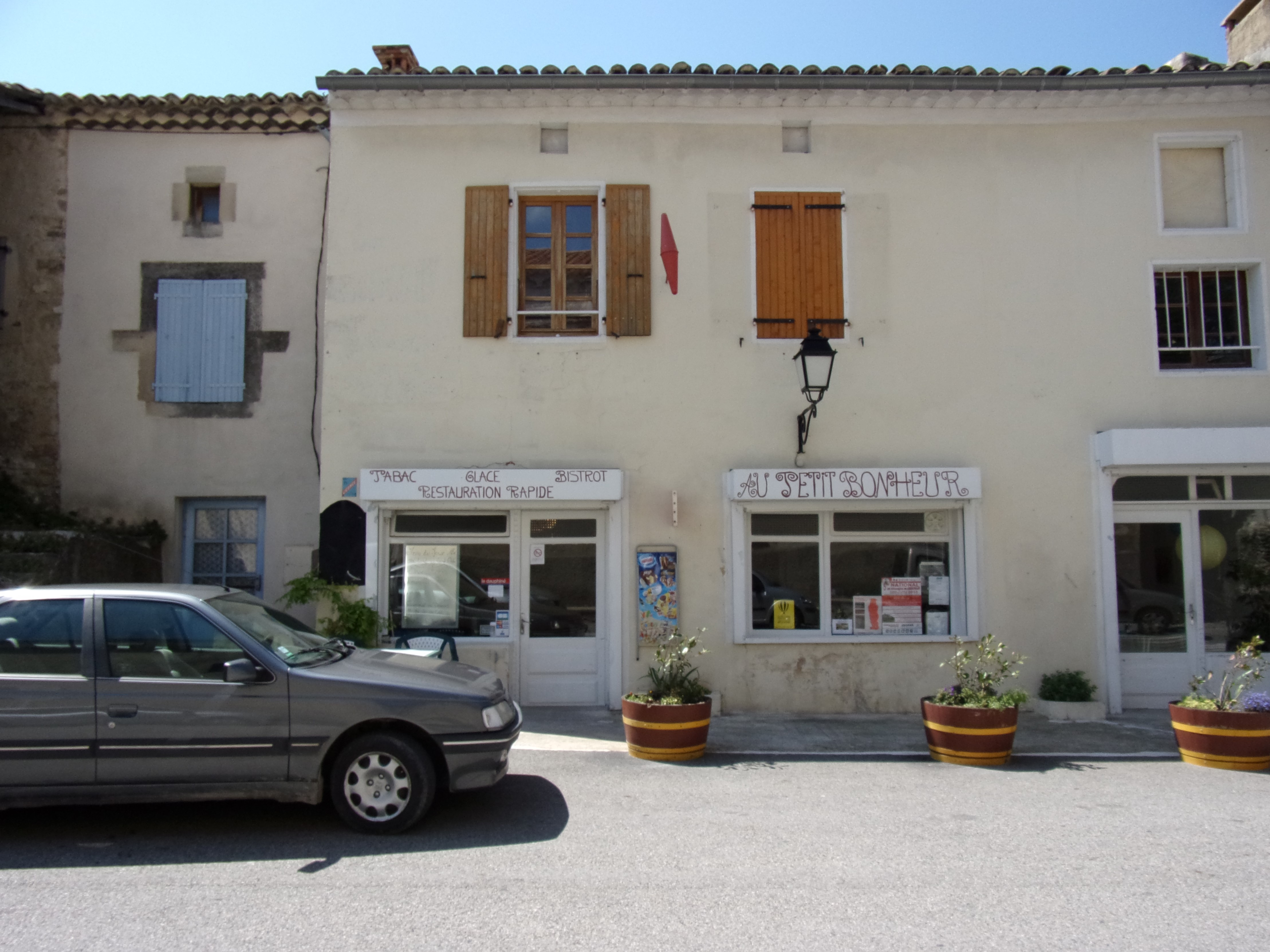 commerce unique de Réauville